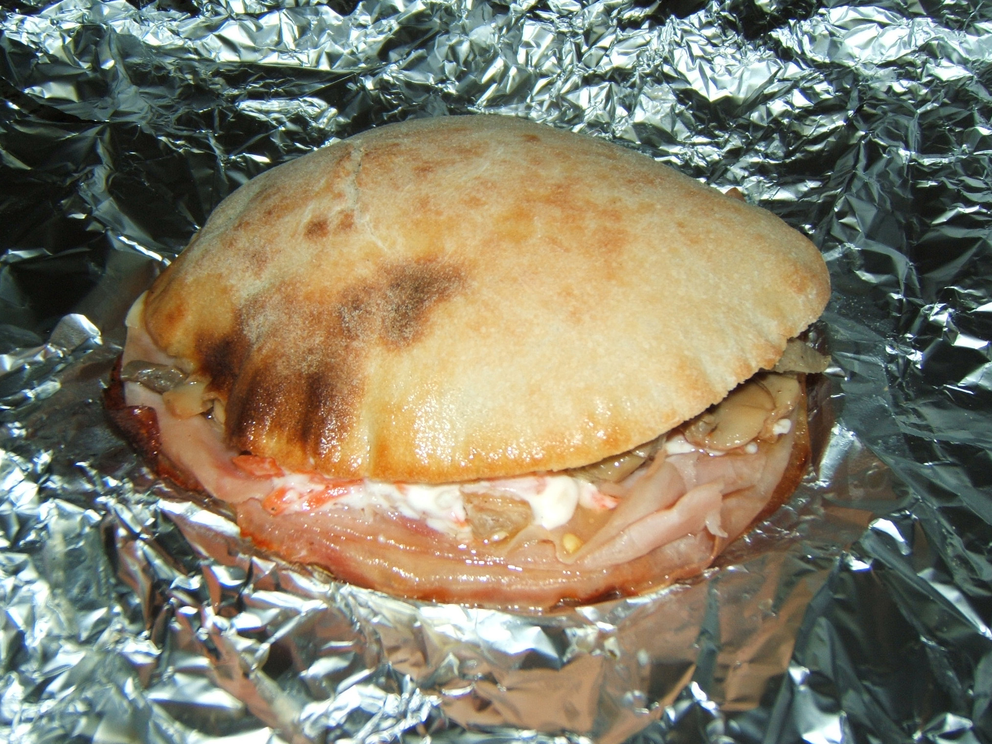 questa è la puccia grande che fanno nelle pizzerie salentine